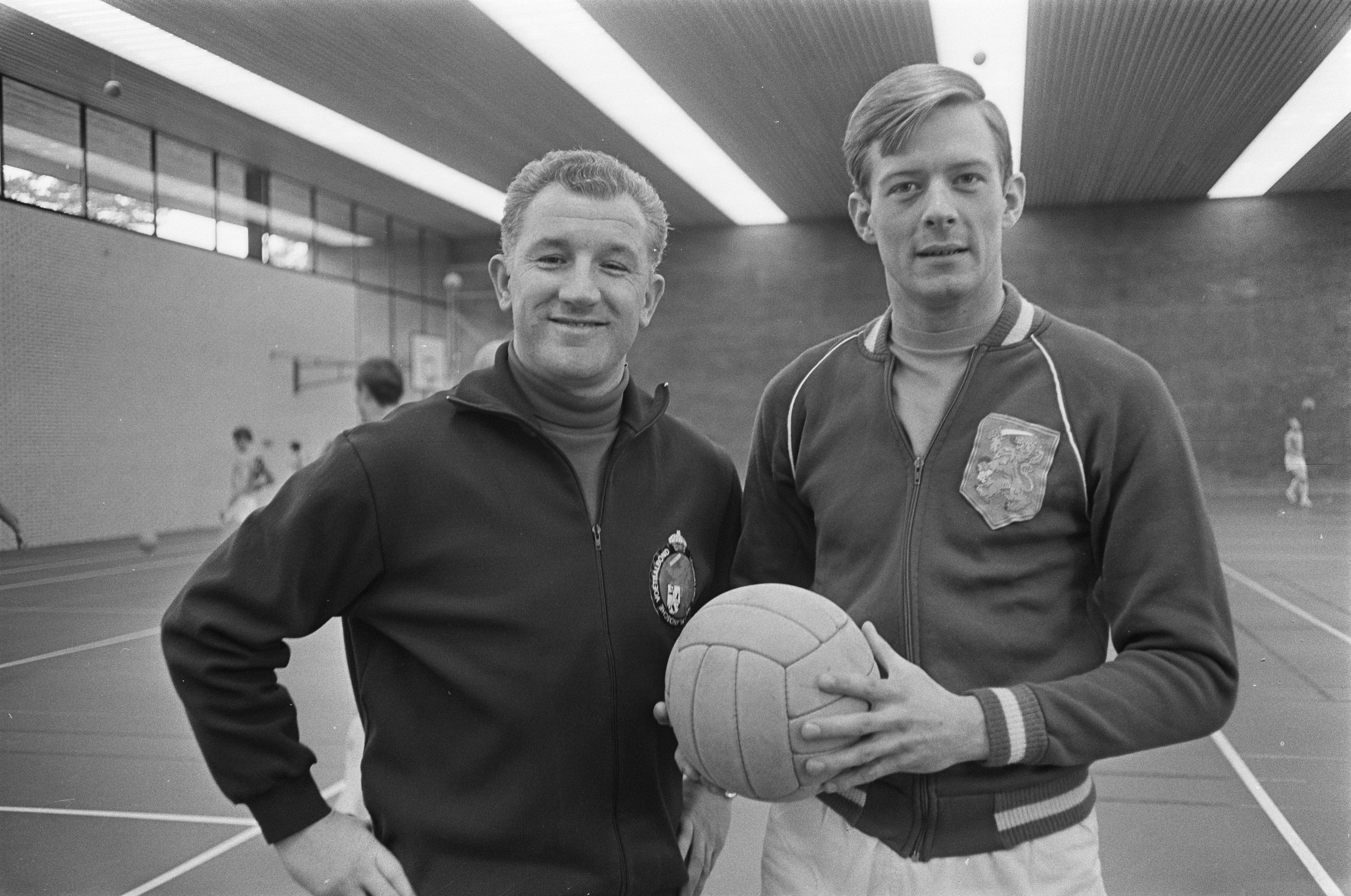 Collectie / Archief : Fotocollectie Anefo Reportage / Serie : [ onbekend ] Beschrijving : Training Nederlands elftal te Zeist, coach Kessler (links met keeper Nico van Zoghel Datum : 7 februari 1968 Locatie : Utrecht, Zeist Trefwoorden : elftallen, keepers, sport, voetbal Persoonsnaam : Zoghel, Nico van Fotograaf : Koch, Eric / Anefo Auteursrechthebbende : Nationaal Archief Materiaalsoort : Negatief (zwart/wit) Nummer archiefinventaris : bekijk toegang 2.24.01.05 Bestanddeelnummer : 921-0566